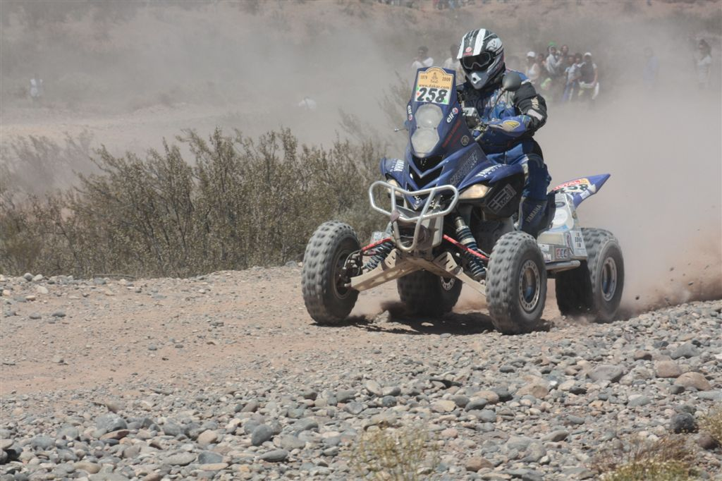 Rally Dakar 2009, etapa 4 Jacobacci Neuquén. El francés Declerc en un squad Yamaha